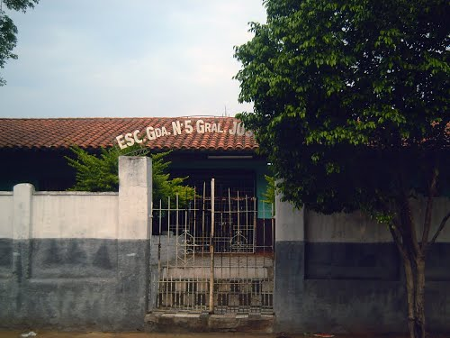 Escuela N°5 Gral. José E. Diaz.